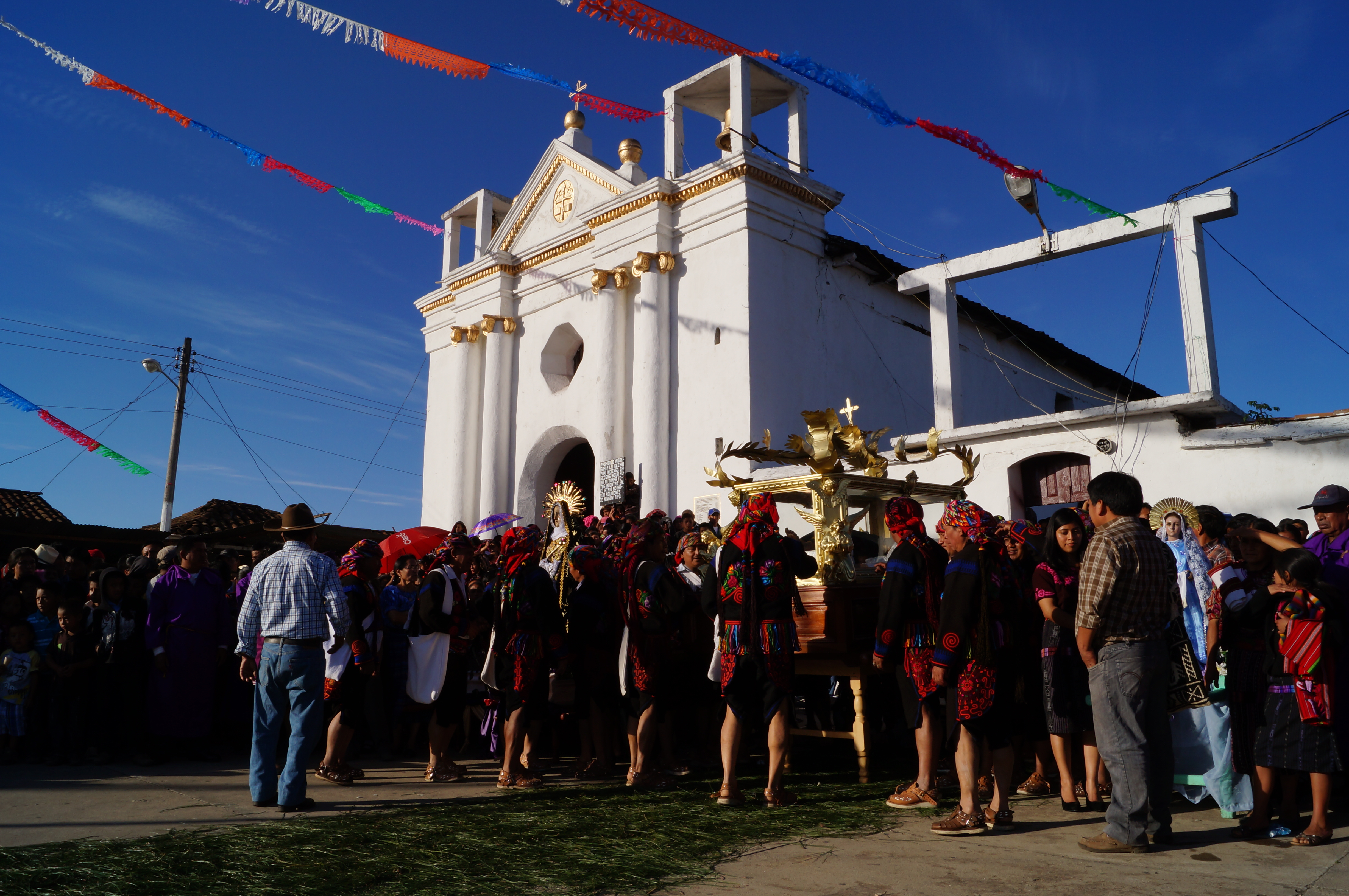 Viernes Santo en Chiché